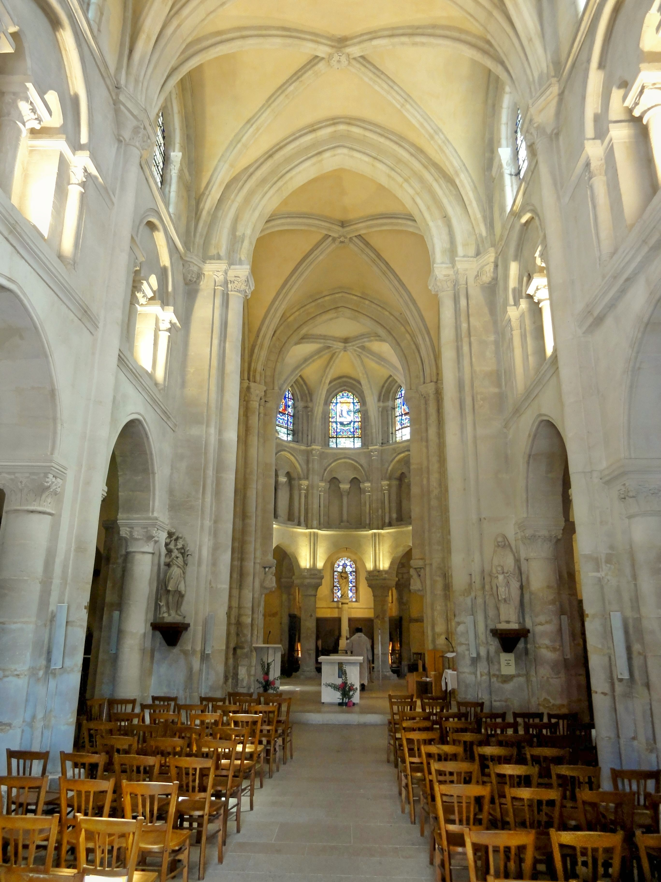 Nef, vue vers l'est.